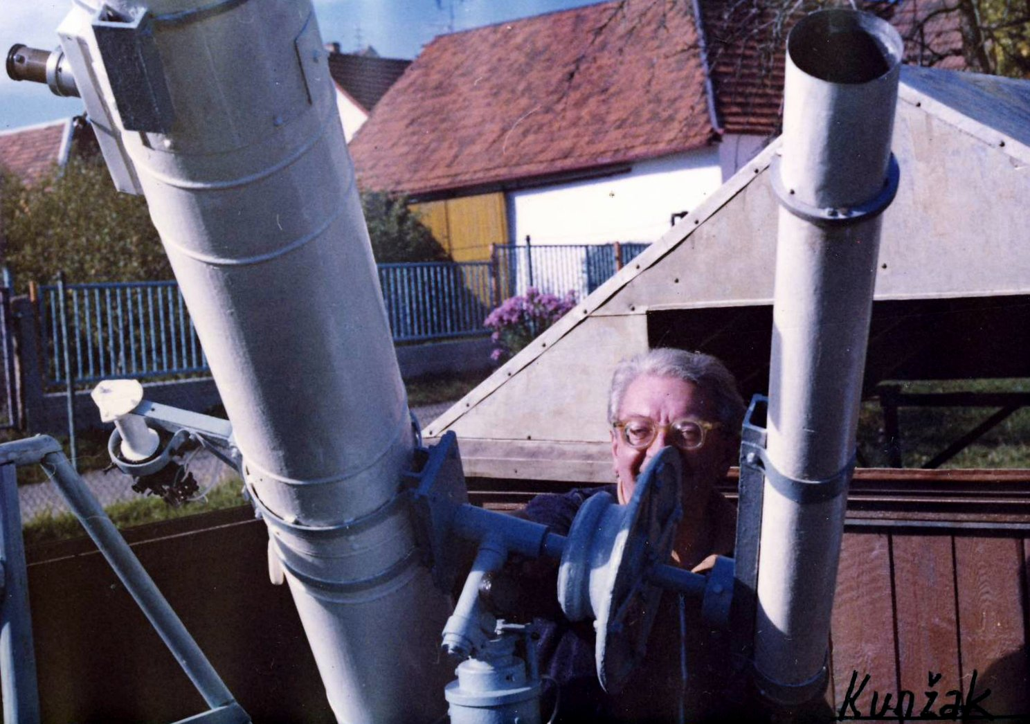 Ladislav Schmied-s dalekohledy